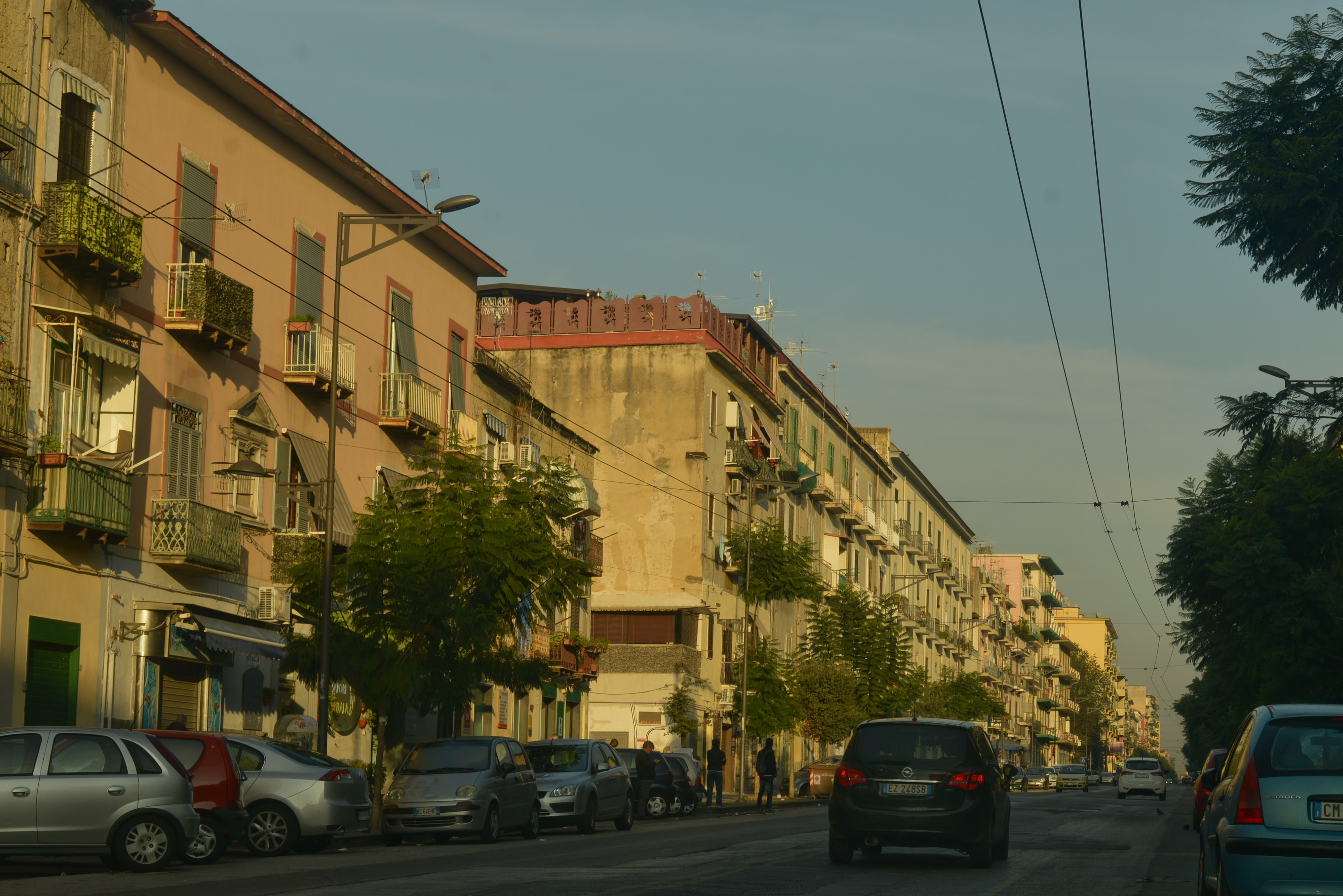 Corso Secondigliano al mattino